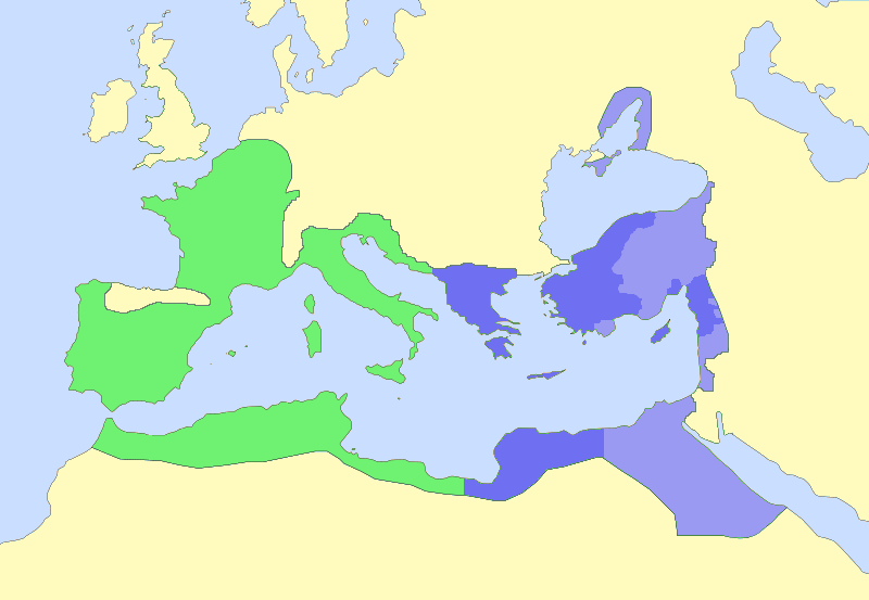 Das Römische Weltreich während des zweiten Triumvirats im Jahr 32 v. Chr. (Dunkelgrün: Octavians Machtbereich im Westen, Dunkelblau: Machtbereich des Marcus Antonius im Osten, Hellblau: Vasallen und Verbündete des Marcus Antonius)